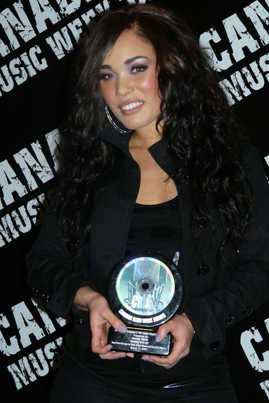 Keisha Turner @ CMW 2009